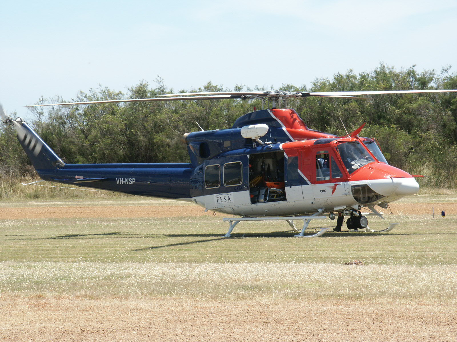 Bell 412 FESA Helicopter.